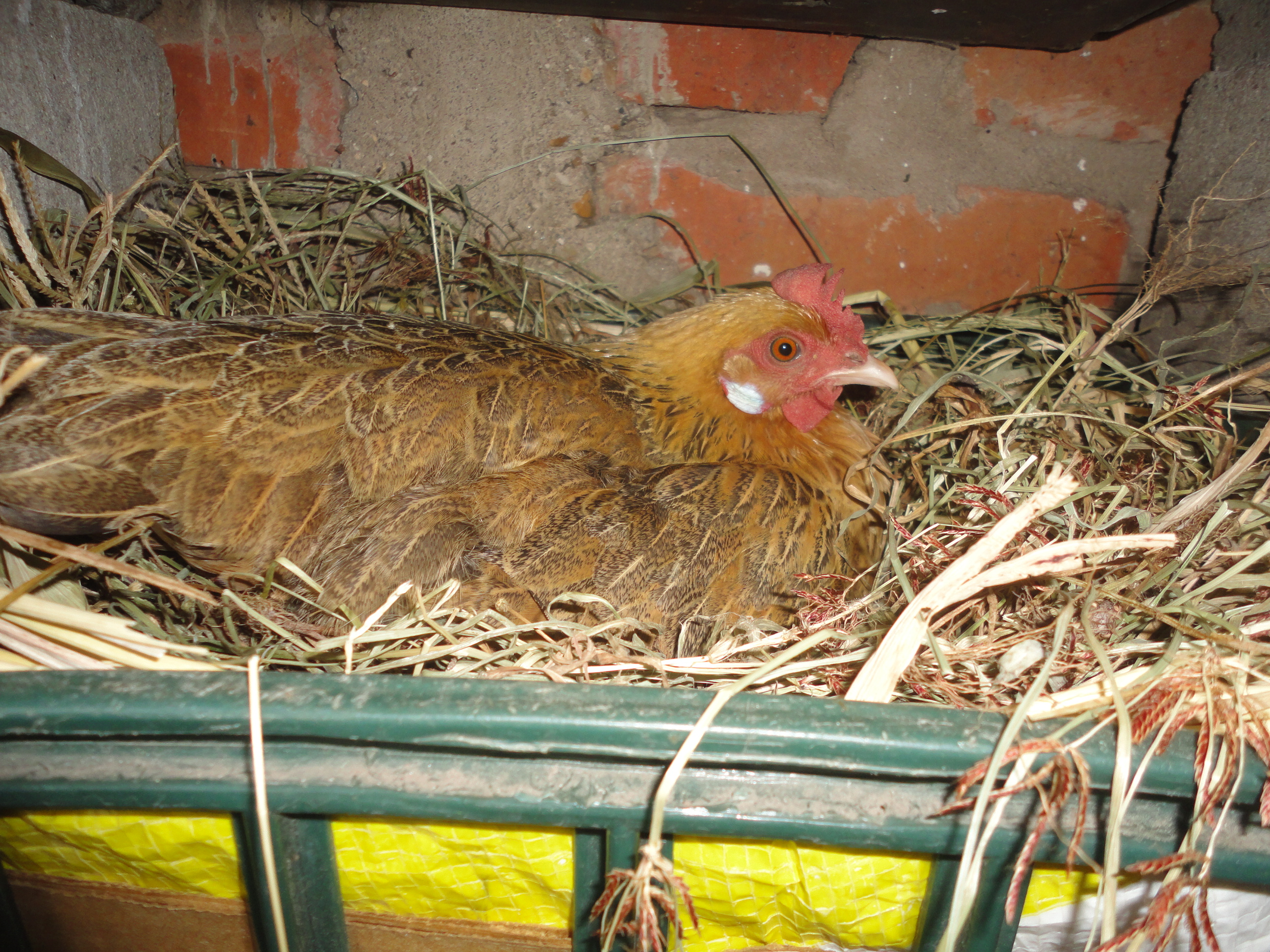 Gallina en su nido